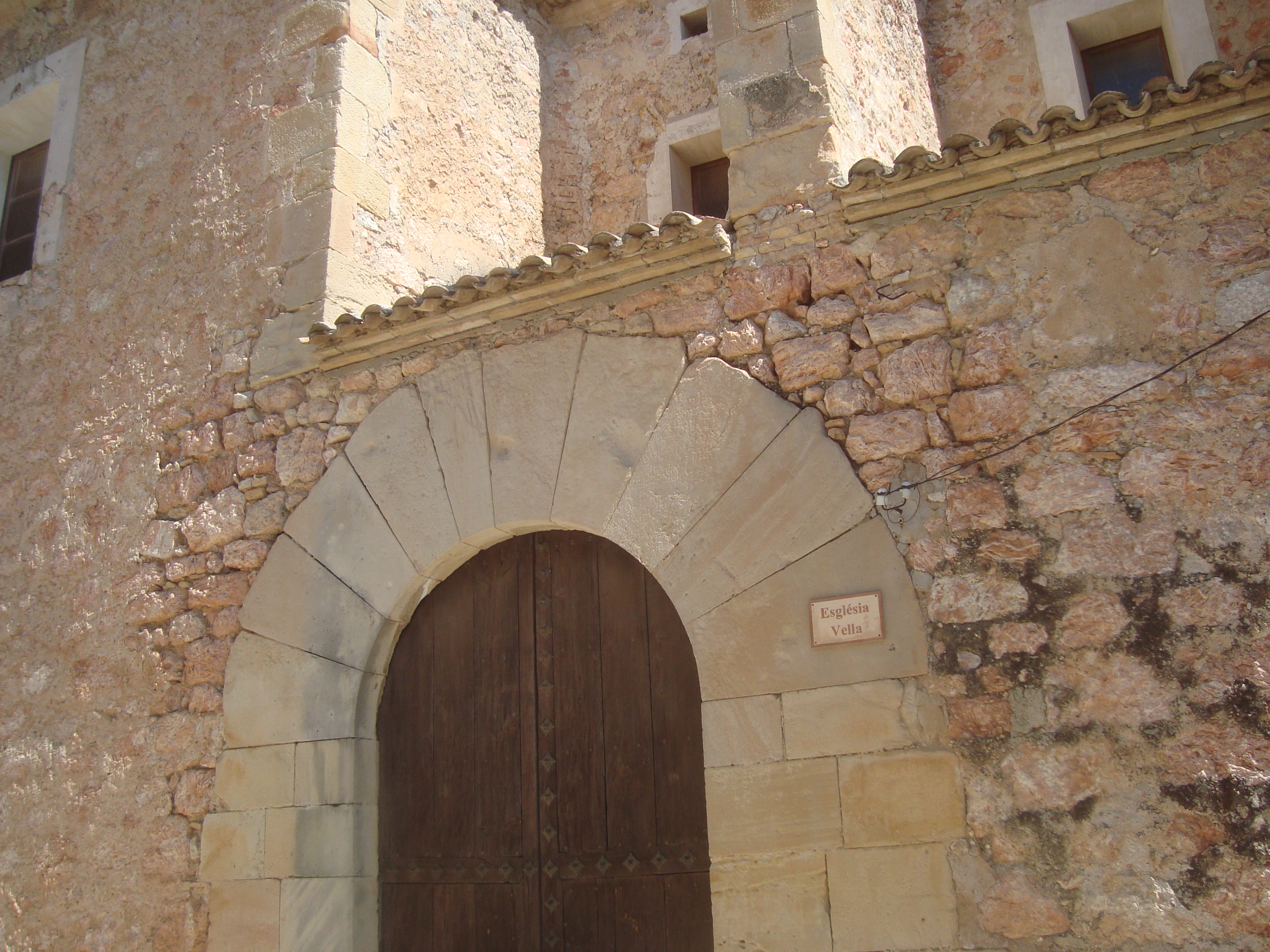 Església vella de Miravet